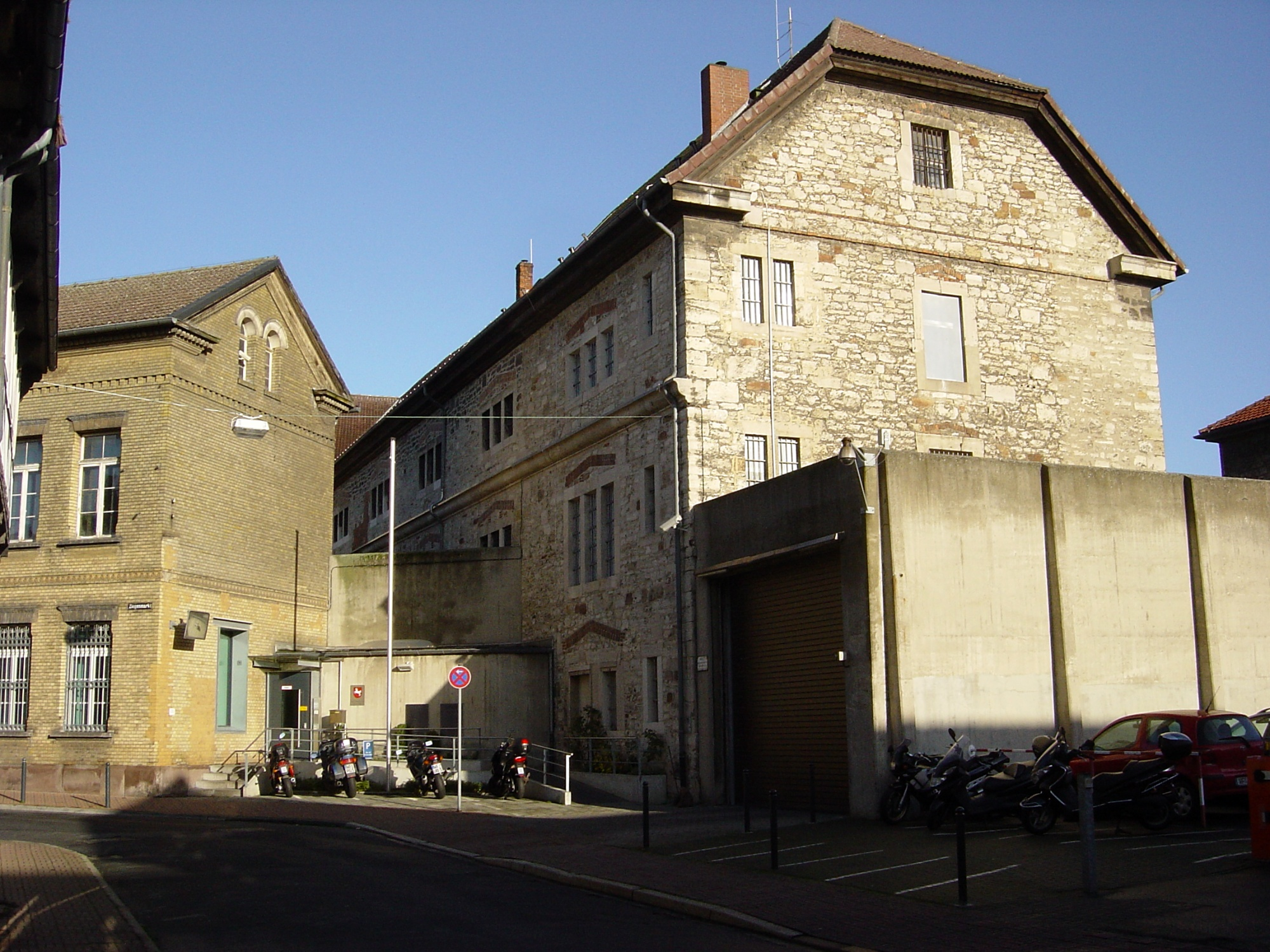 Justizvollzugsanstalt Wolfenbüttel, Ziegenmarkt, 38300 Wolfenbüttel